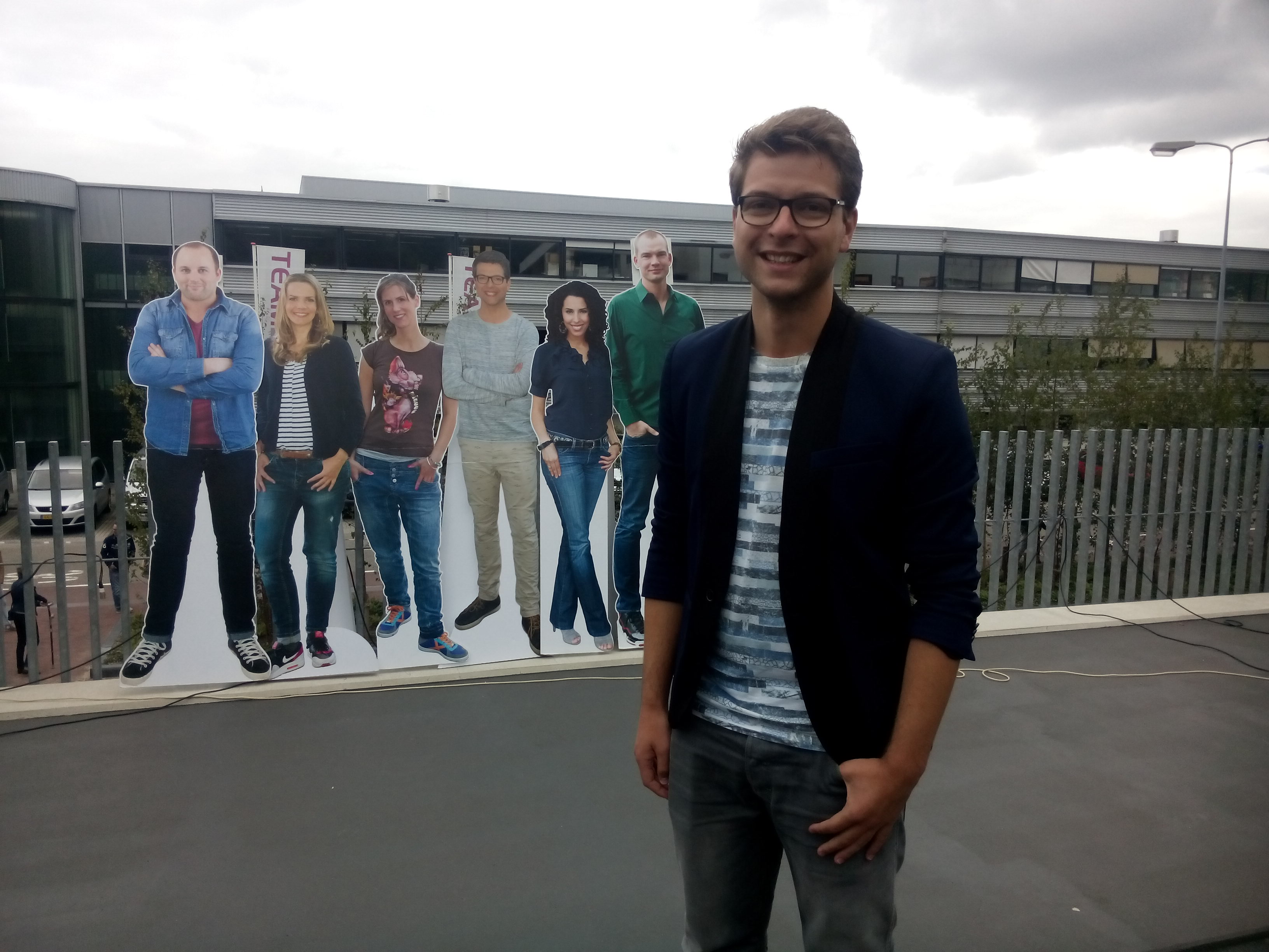 Robbie Kammeijer op open studio dagen 2015 voor NOS gebouw in Hilversum. Op achtergrond huidig team van presentatoren van Jeugdjournaal.